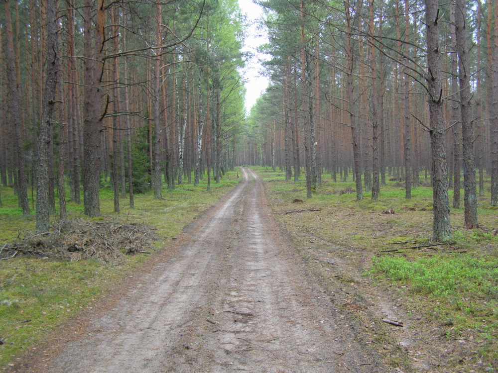 Krasne forest